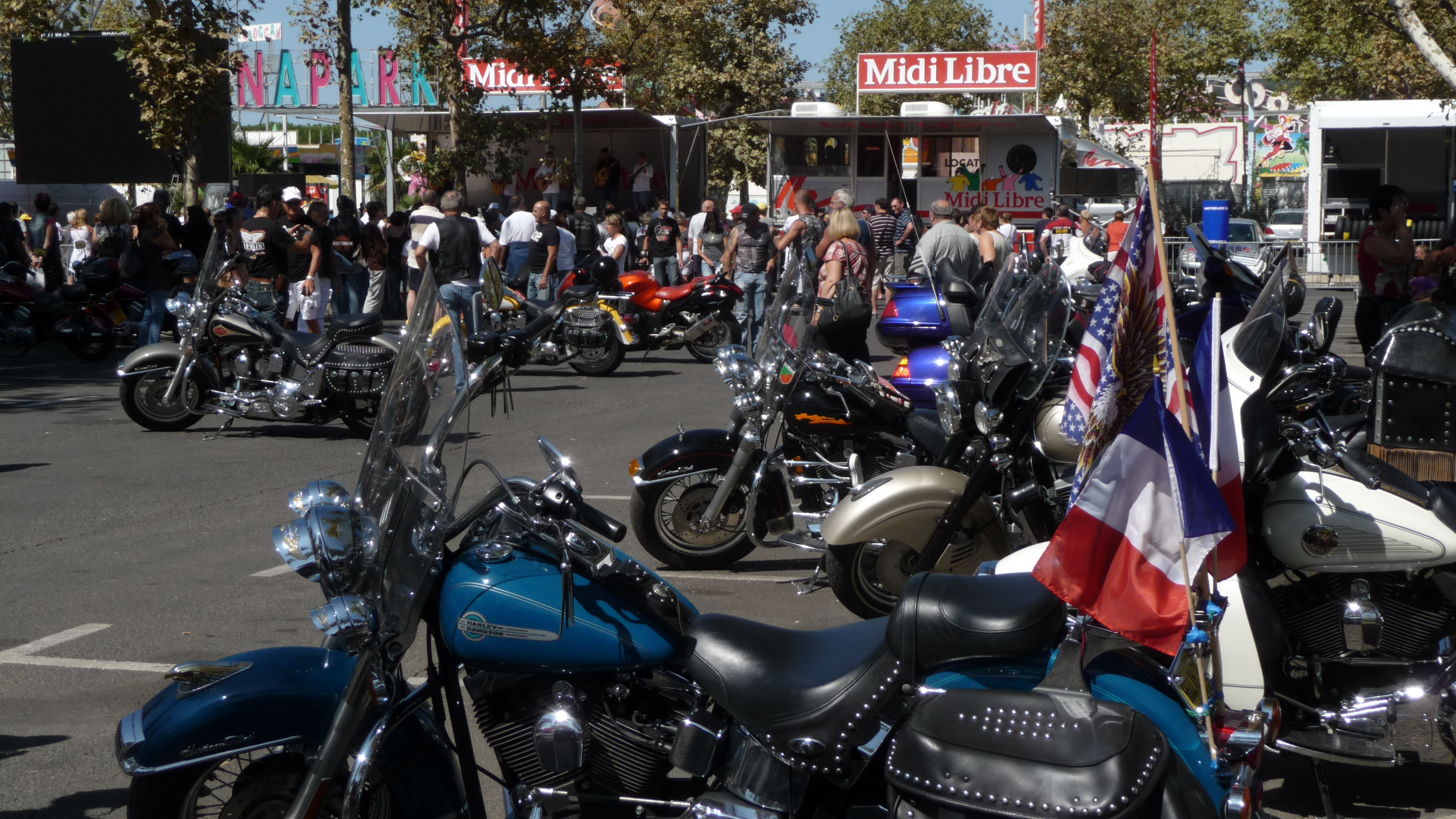 Rassemblement des Brescoudos (Harley-Davidson) à Agde (Hérault, France)